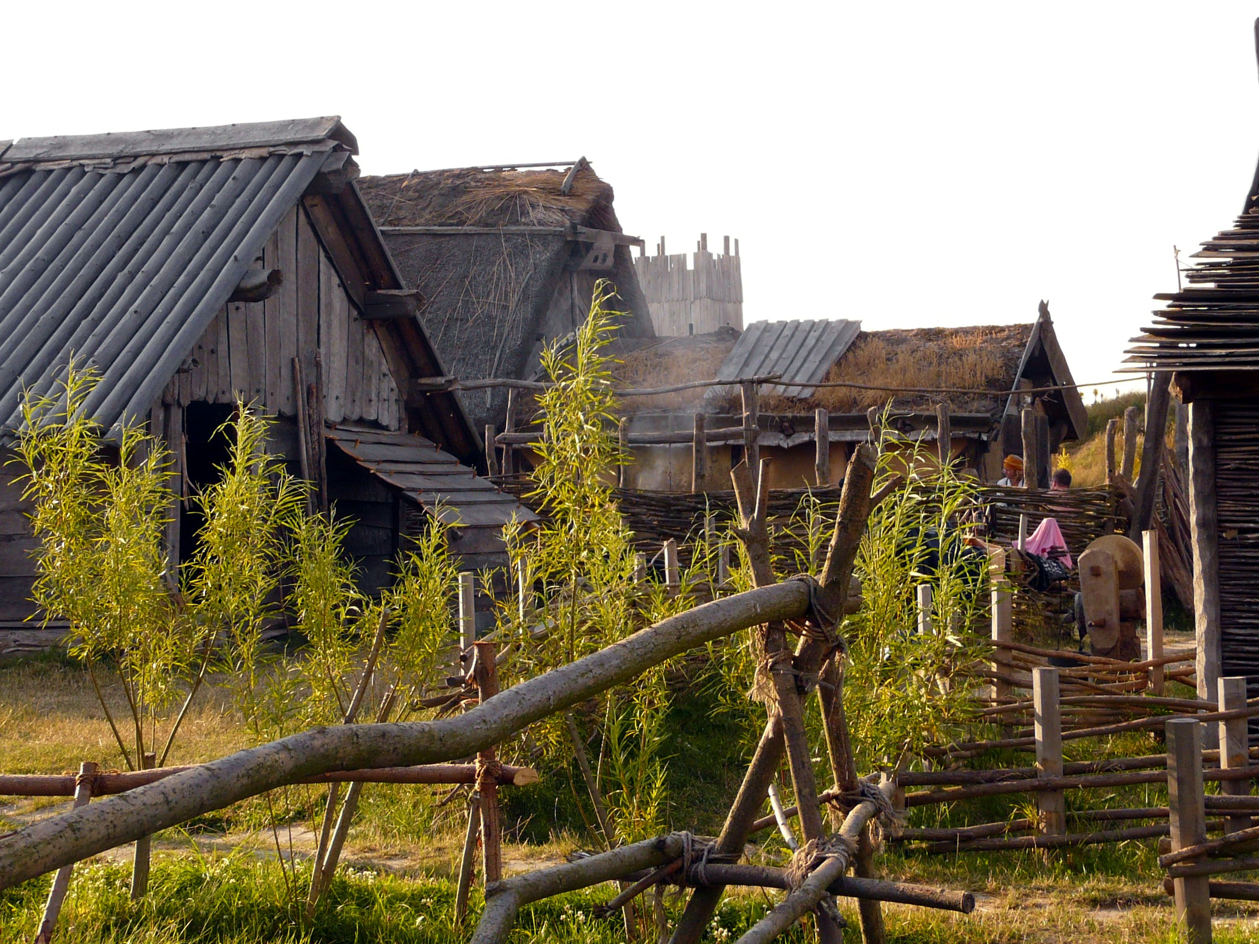 Mitten im Dorf vom "Vikingareservat Foteviken" (Höllviken, Schweden)